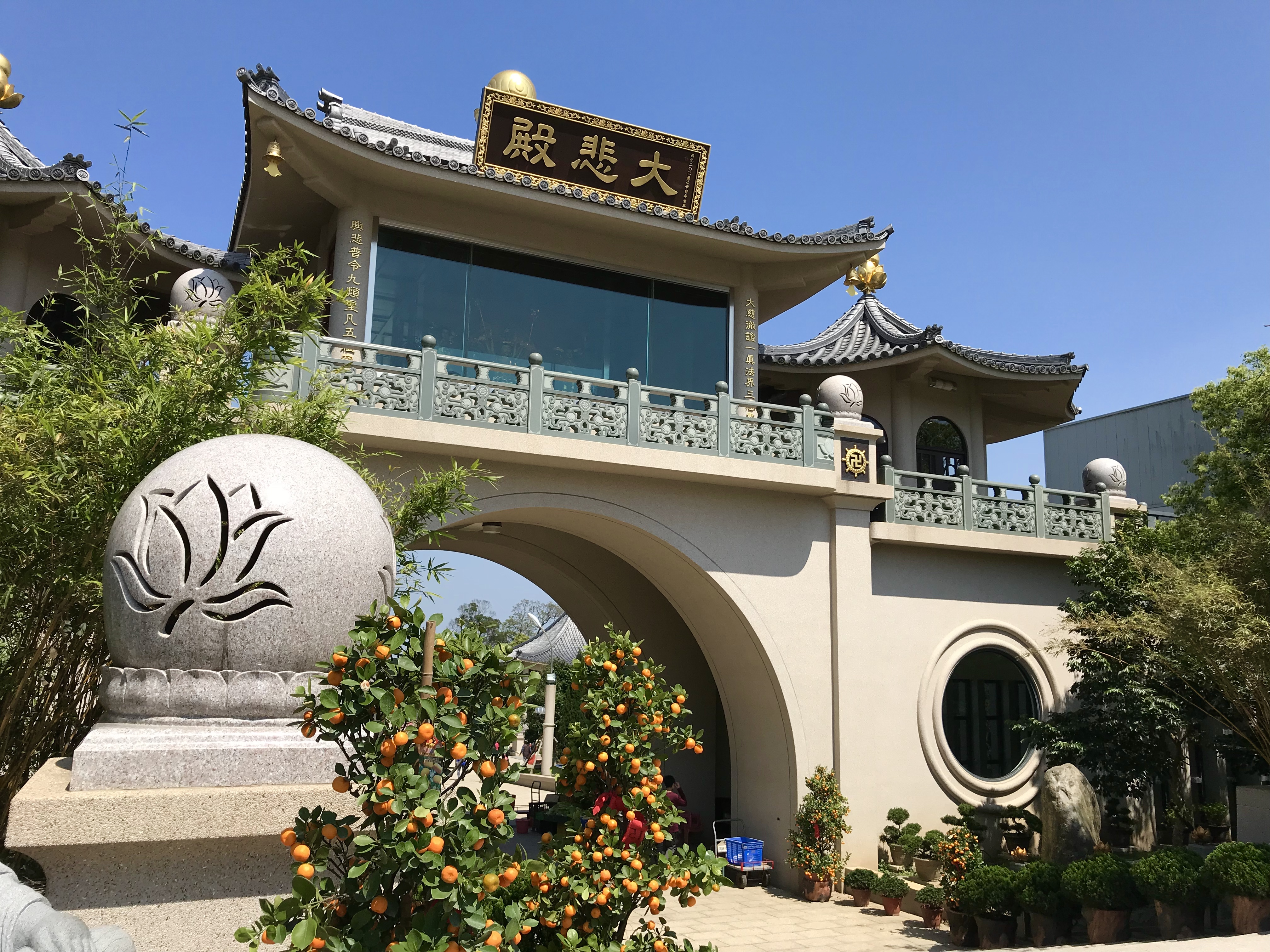 中文（台灣）: 銅鑼九華山大興善寺大悲殿